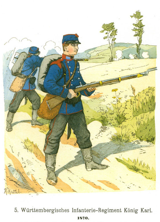 Knötel, Band IV, Tafel 26: Infanterie des kgl. Württembergischen Infanterieregiments Nr. 5 (1870)